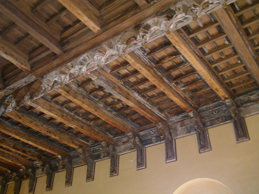 Kastell von Carini, Balkendecke im großen Saal